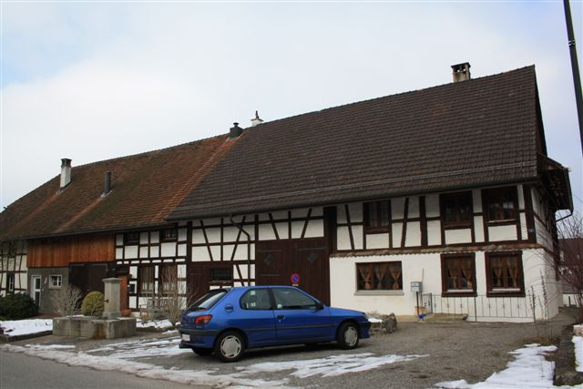 Riegelhaus in (Unter-)Ehrendingen AG, Schweiz